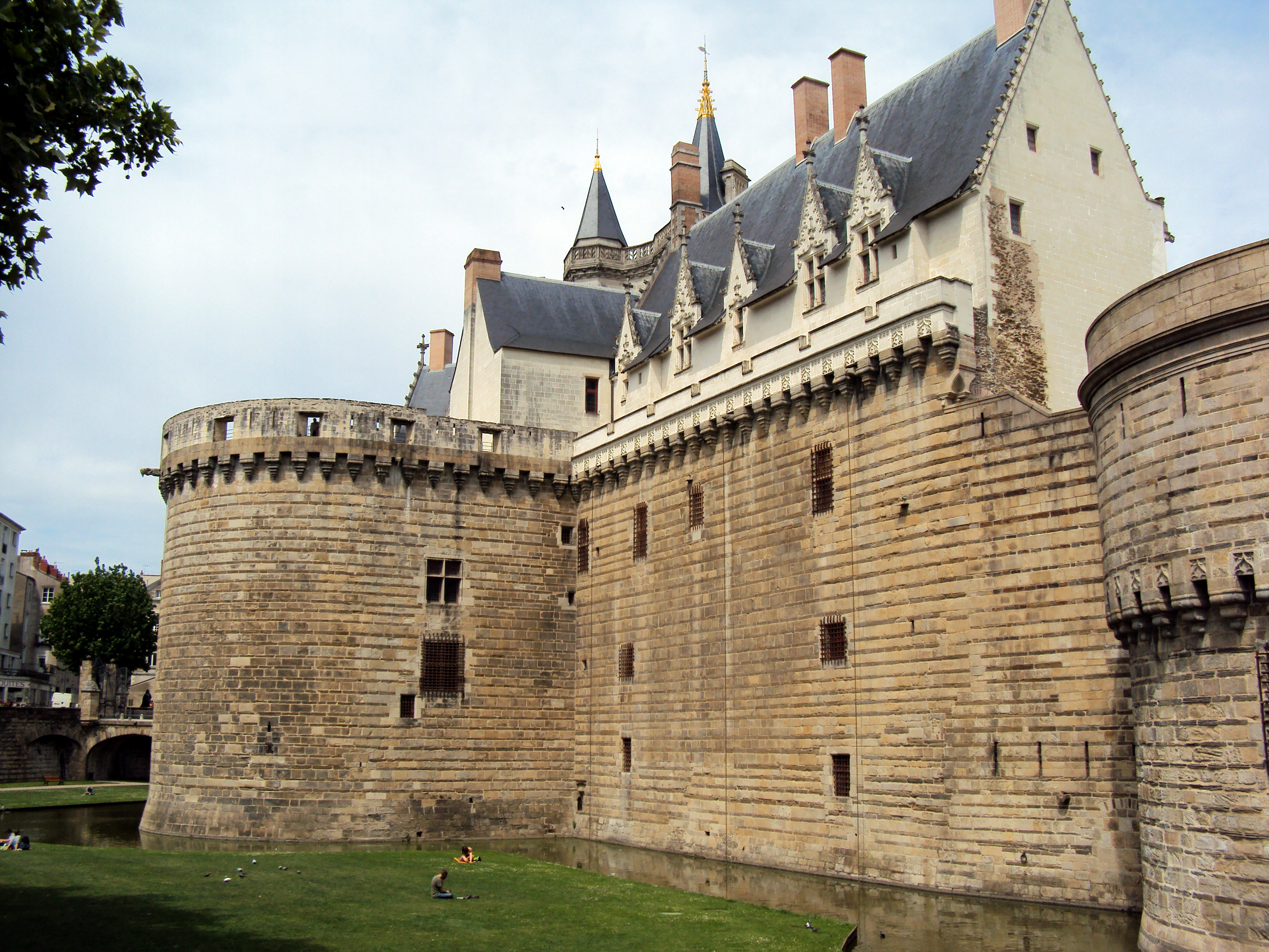 Le célèbre château des Ducs de Bretagne à Nantes - Centre politique de la Bretagne historique avant son rattachement définitif à la France en 1532